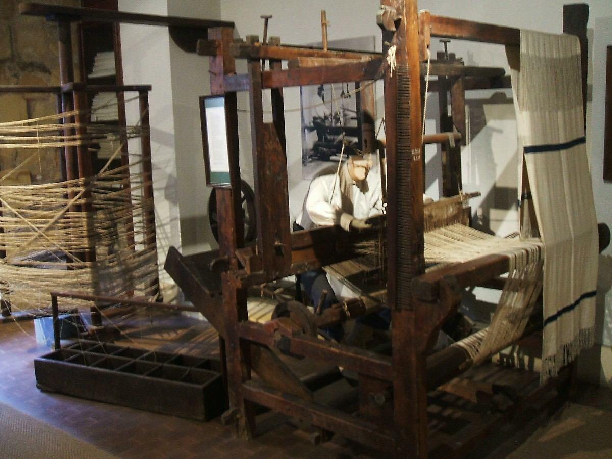 Museo Vasco de Bilbao